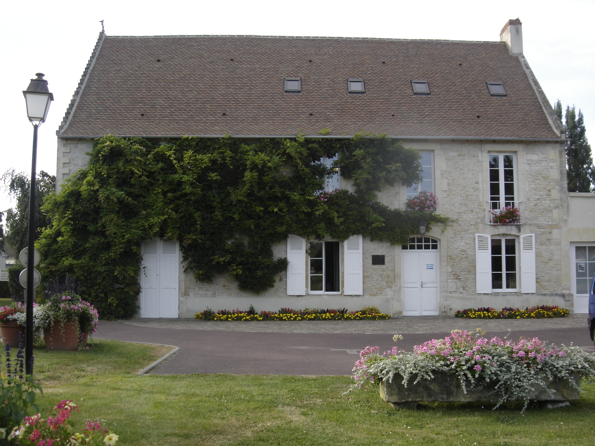 façade principale de la mairie de Bavent